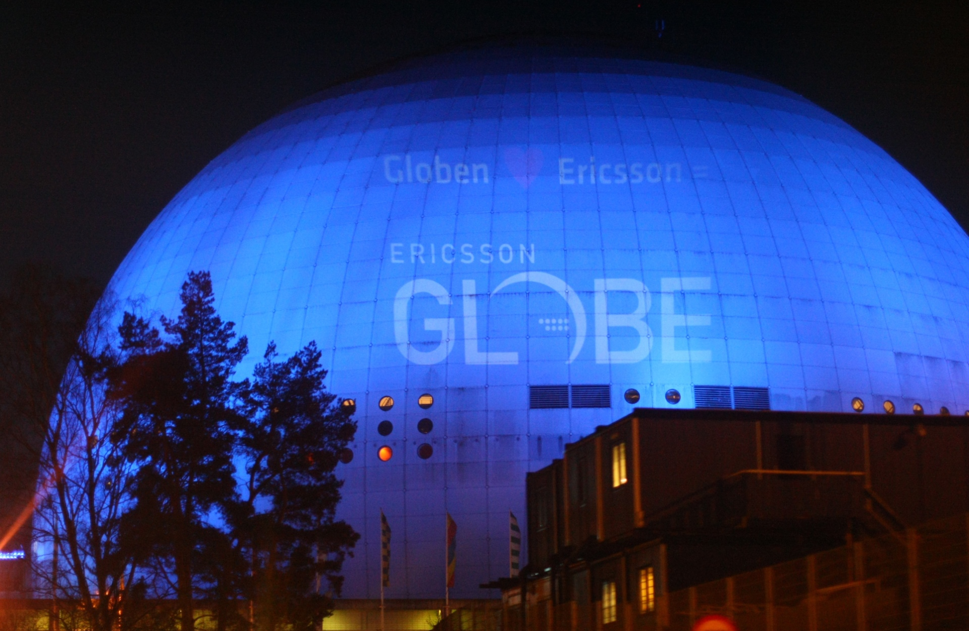 Globen byter namn till Ericsson Globe Globens nya officiella och internationella namn står nu klart – Ericsson Globe. Namnändringen sker idag i samband med att det tioåriga samarbetet mellan Stockholm Globe Arenas och Ericsson träder i kraft. Detta är första dagen med nya texten! Camera Canon EOS 40D Exposure 0.017 sec (1/60) Aperture f/1.8 Focal Length 50 mm ISO Speed 1600